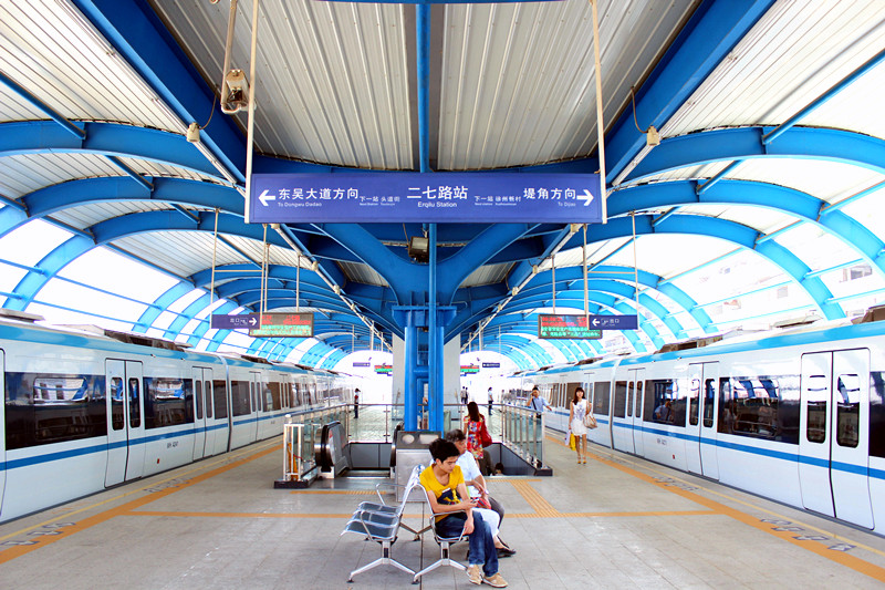 武汉地铁1号线